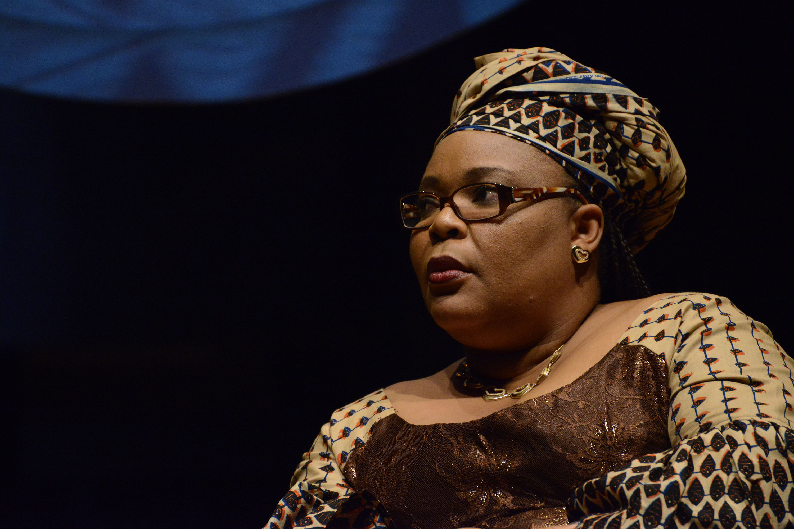 Leymah Gbowee no Fronteiras do Pensamento Porto Alegre 2013